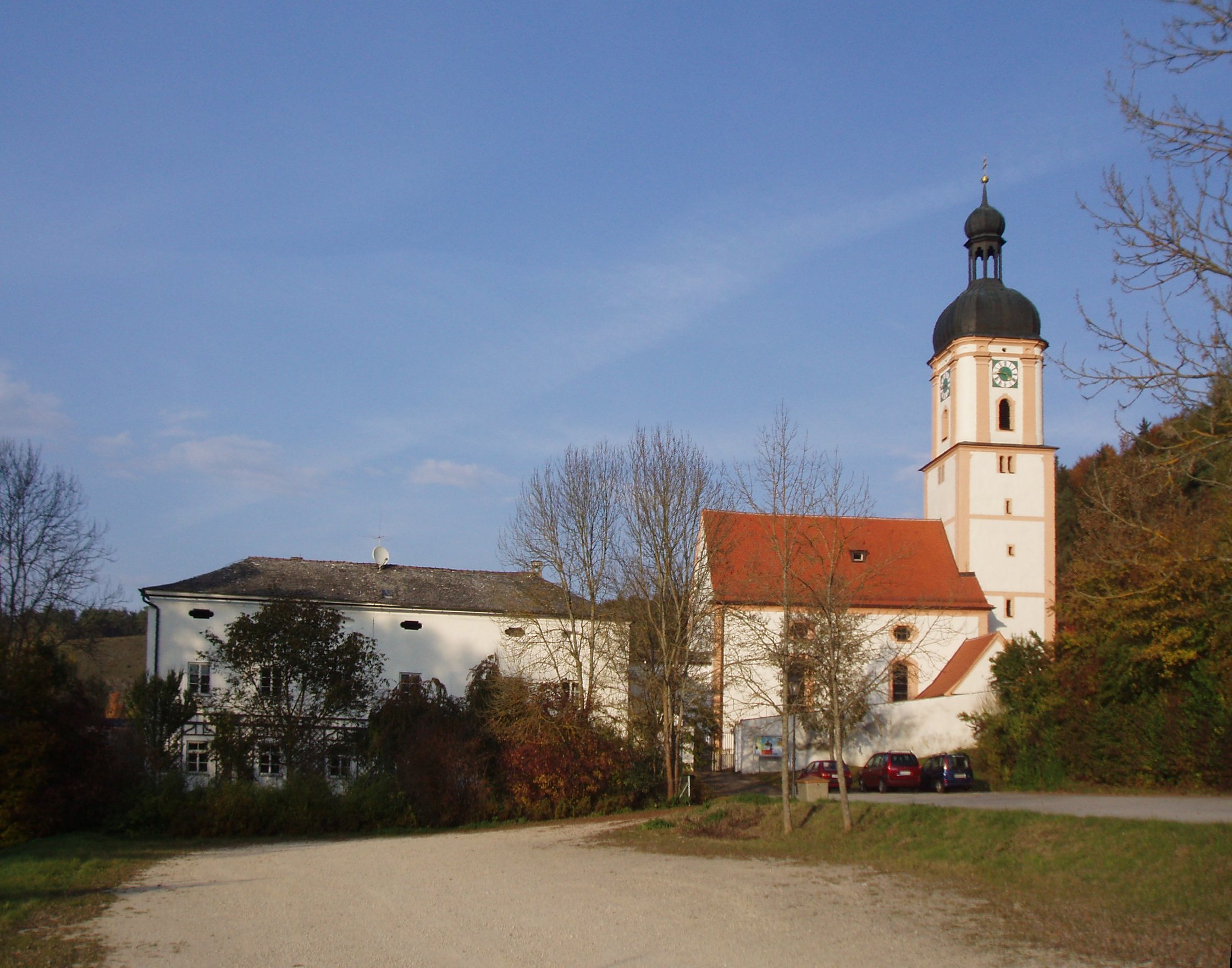 Riedenburg-Schambach Barockkirche Mariä Heimsuchung